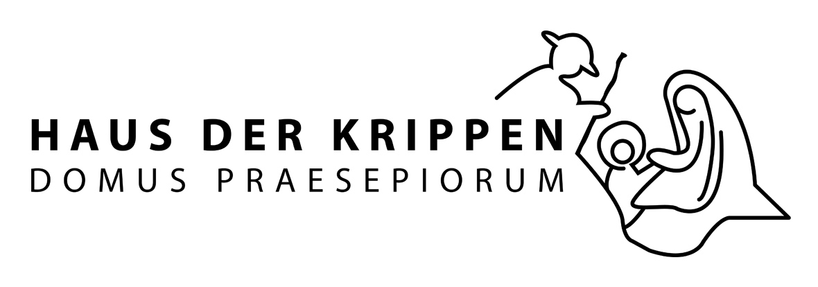 Logo Haus der Krippen - Domus Praespiorumg - Krippenmuseum Klüsserath